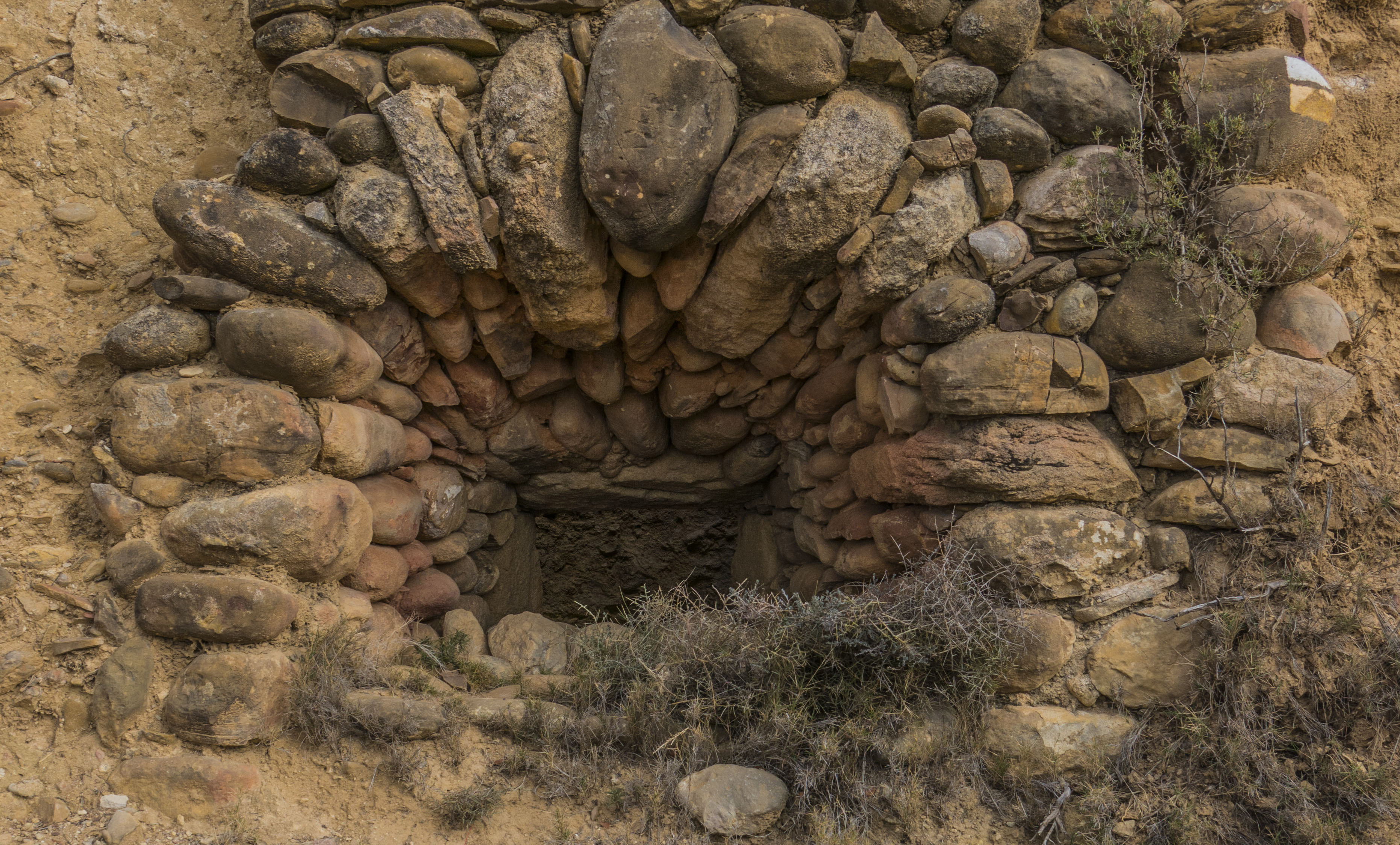 Situat entre Güel, antic municipi de la Ribagorça, i Fontova, al terme de Graus.